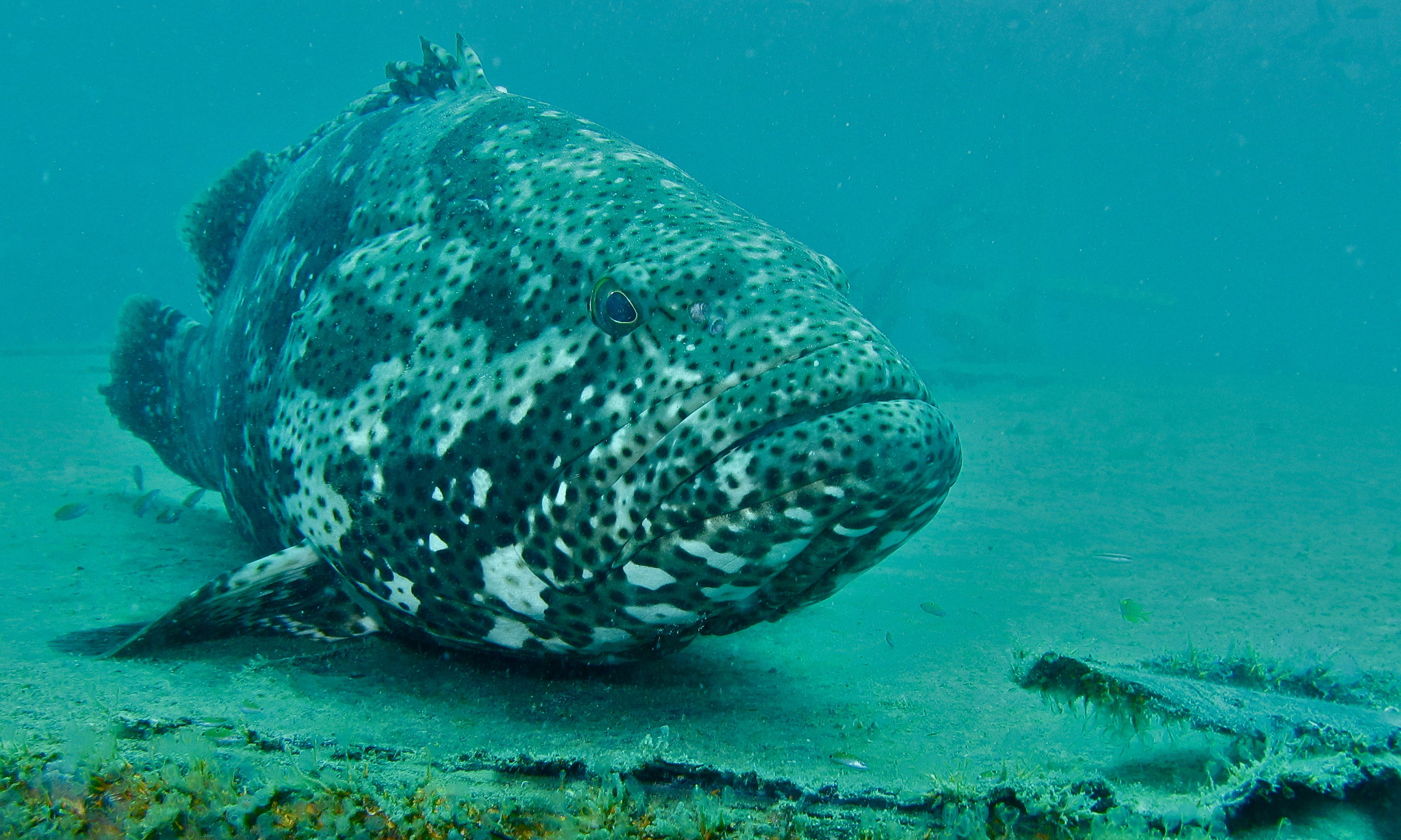 House Reef, Kapalai, Sabah, MALAYSIA